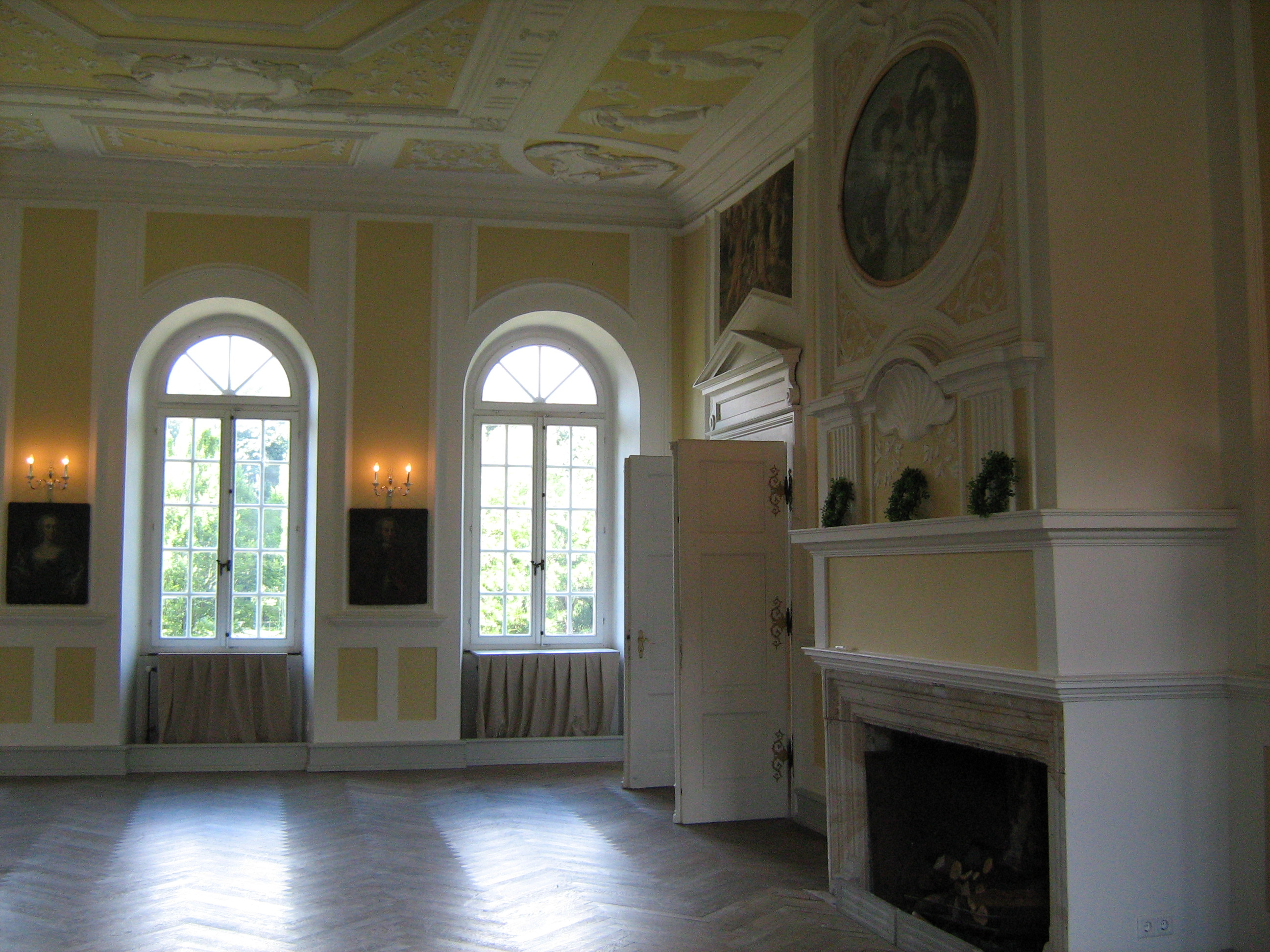 ein Teil vom ehemaligen großer Schlafraum in Gut Leye im Jahr 2008